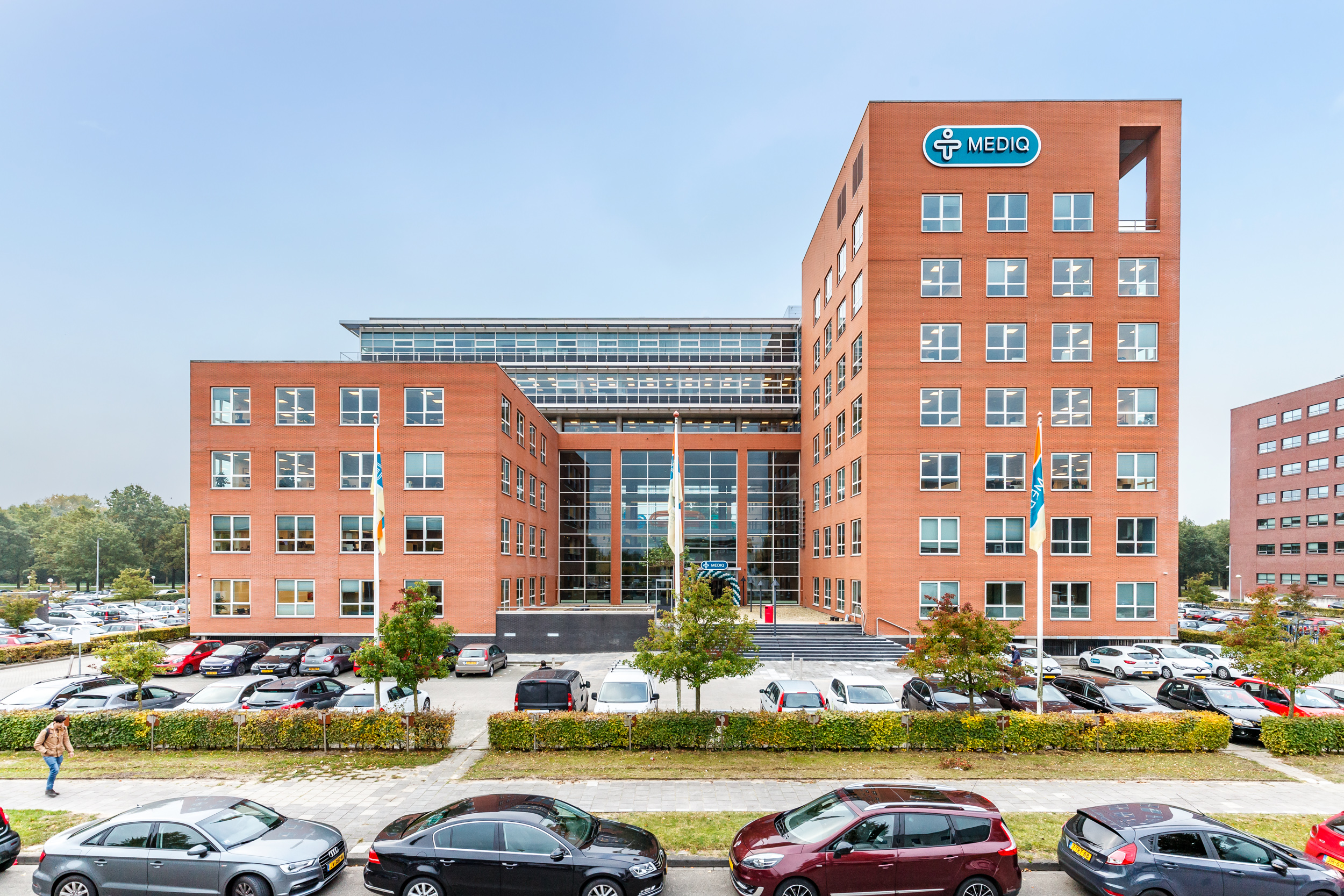 Hoofdkantoor in de Meern, Utrecht.